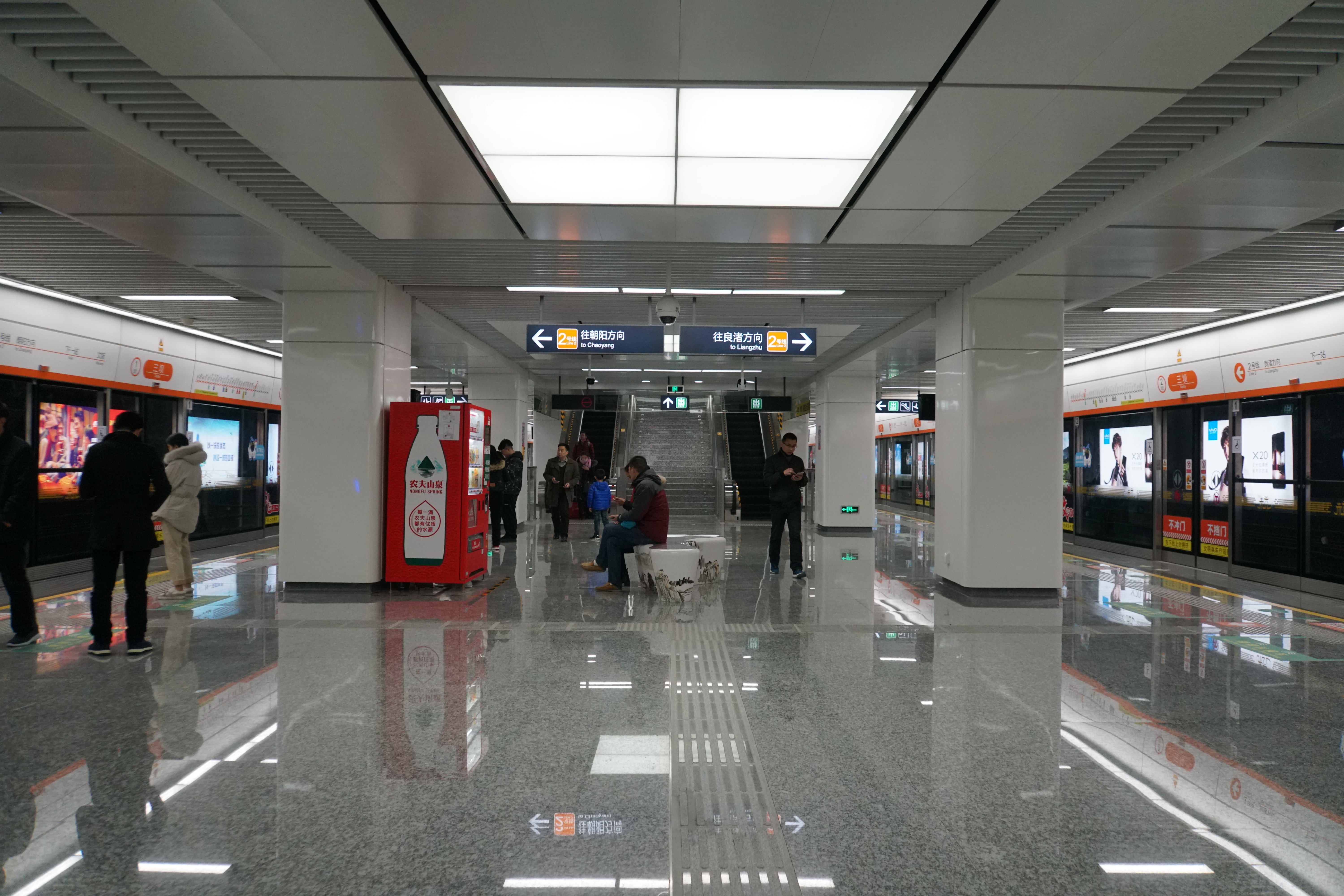 三坝站站台